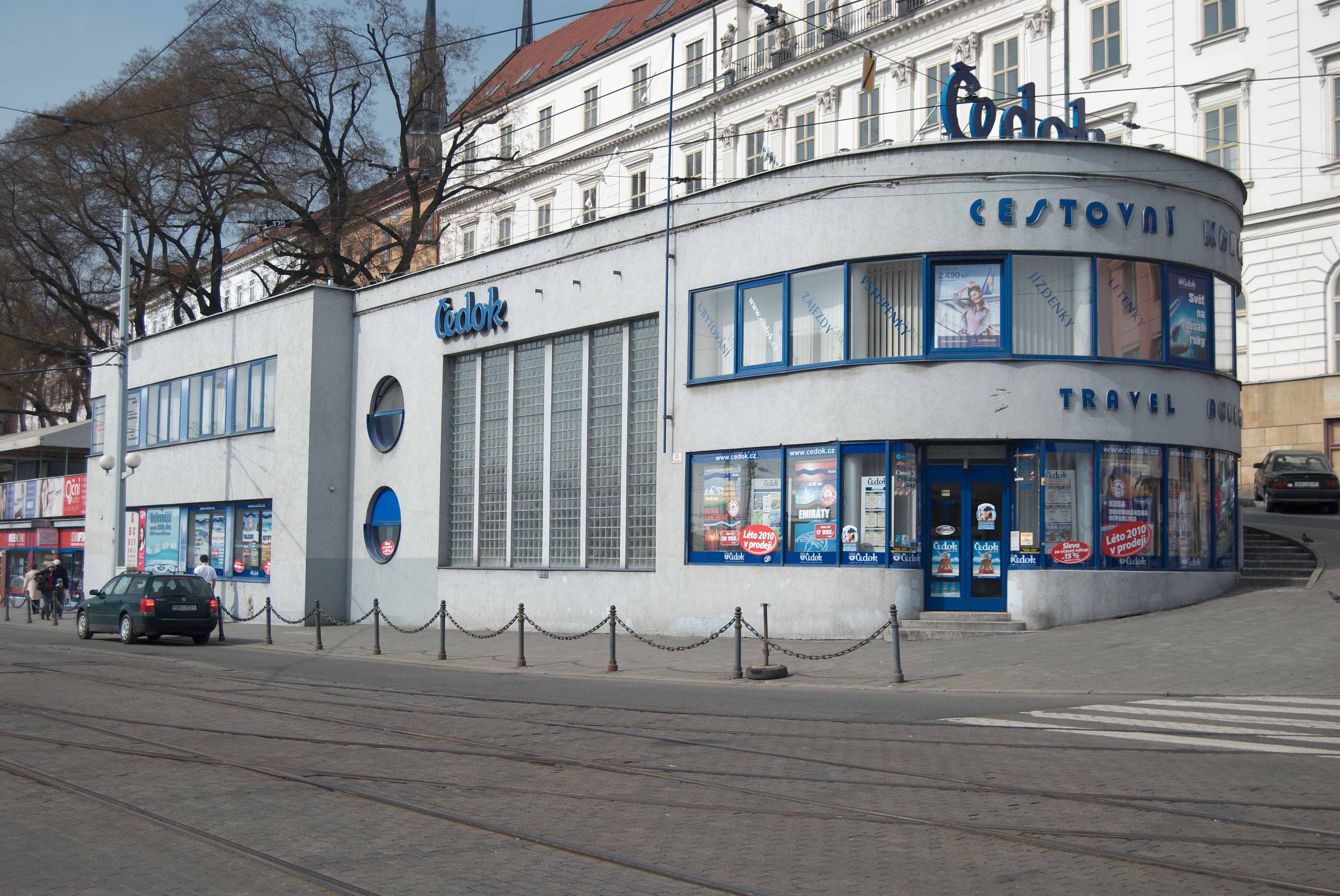 Město Brno - funkcionalistická budova Čedoku. Objekt byl postaven roku 1928 podle návrhu architekta O. Pořísky a původně sloužil jako centrální ubytovací kancelář tehdejší Výstavy soudobé kultury v Československu (viz